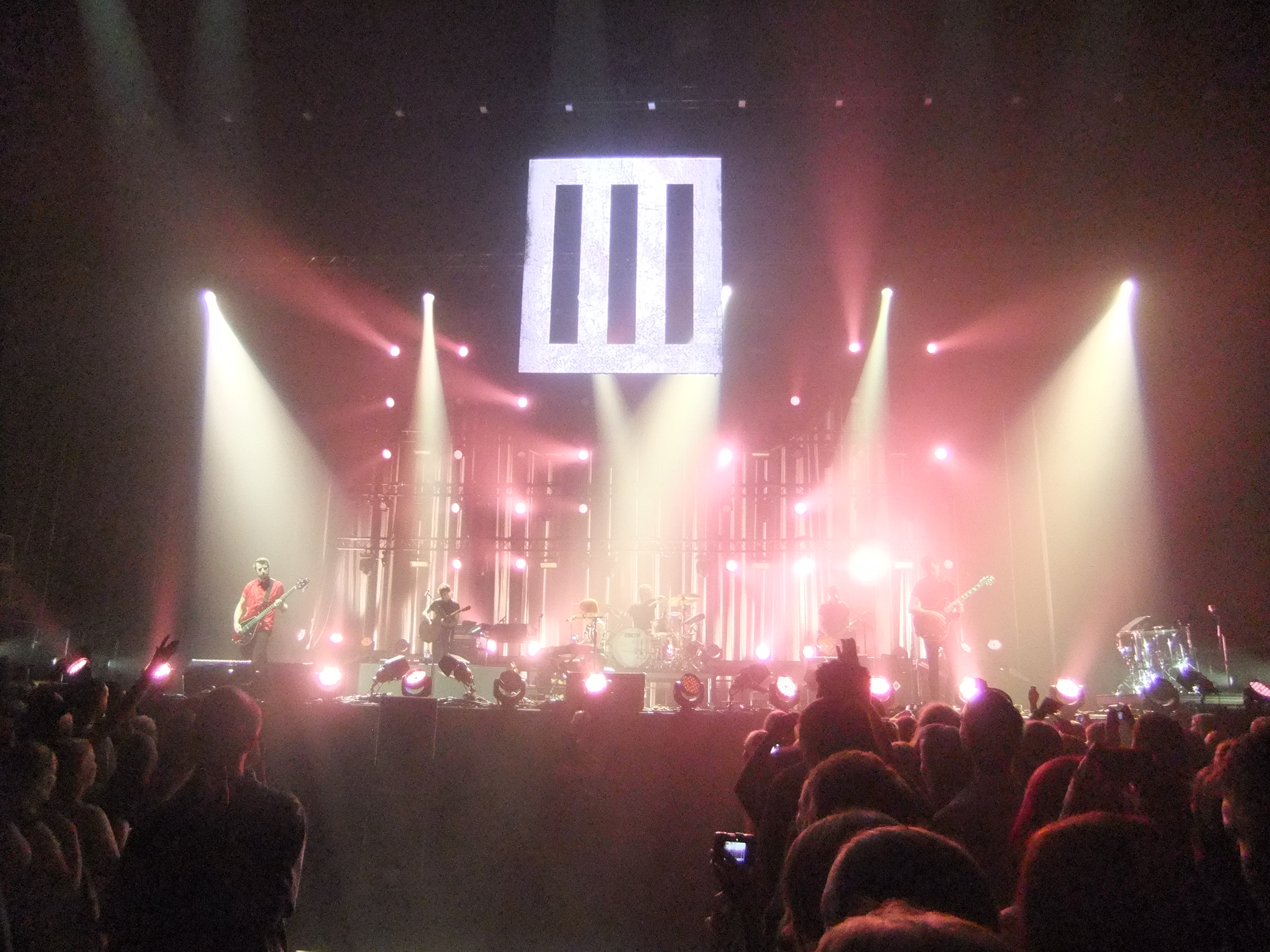 Paramore en vivo en Ámsterdam el 5 de septiembre de 2013. En la imagen: Paramore.